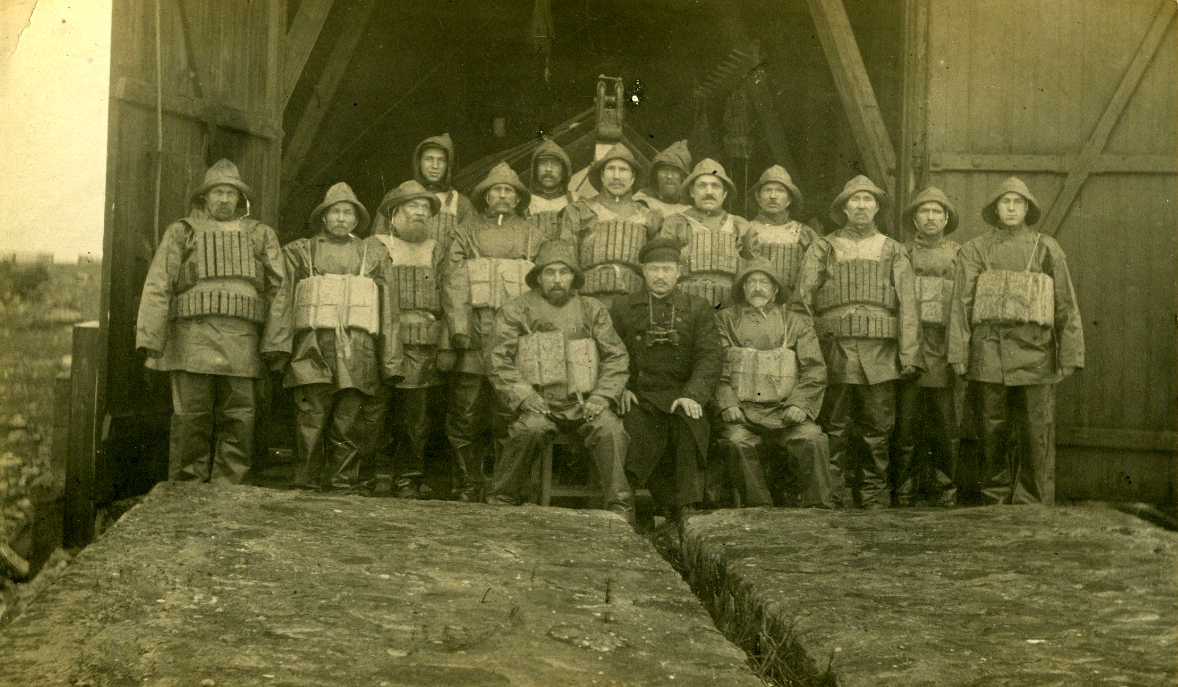 Vilsandi päästemeeskond